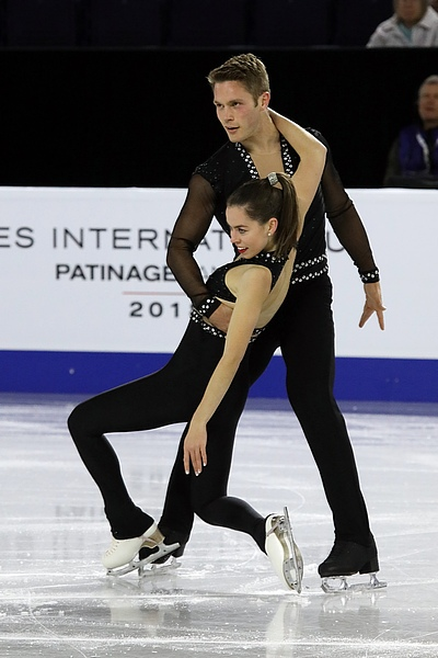 Эвелин Уолш и Треннт Мишо на этапе Гран-при Skate Canada 2018